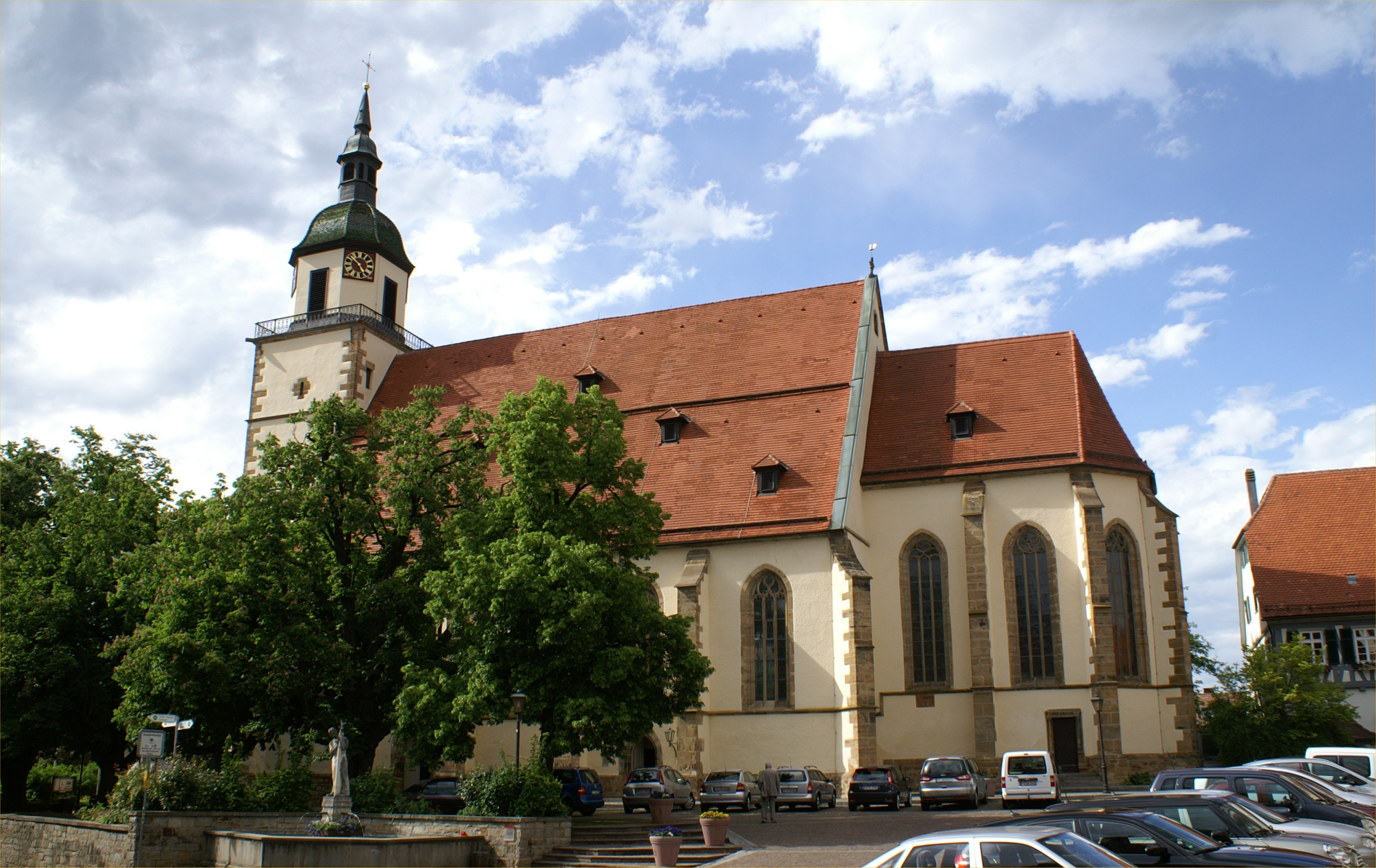 Peterskirche in Weilheim an der Teck